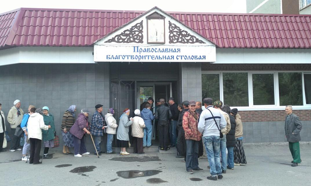 Благотворительная столовая при Александро-Невском Ново-Тихвинском монастыре г. Екатеринбург, очередь ожидающих нового захода на обед снаружи, вид фасада.